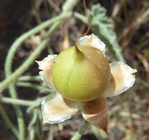 Convolvulus althaeoides; fruto (cápsula) - Cabezo de Pallarés, Albatera, (Alicante, España).